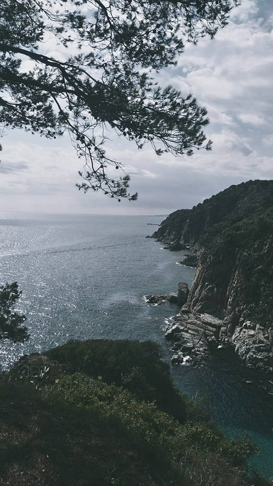 Пејзаж